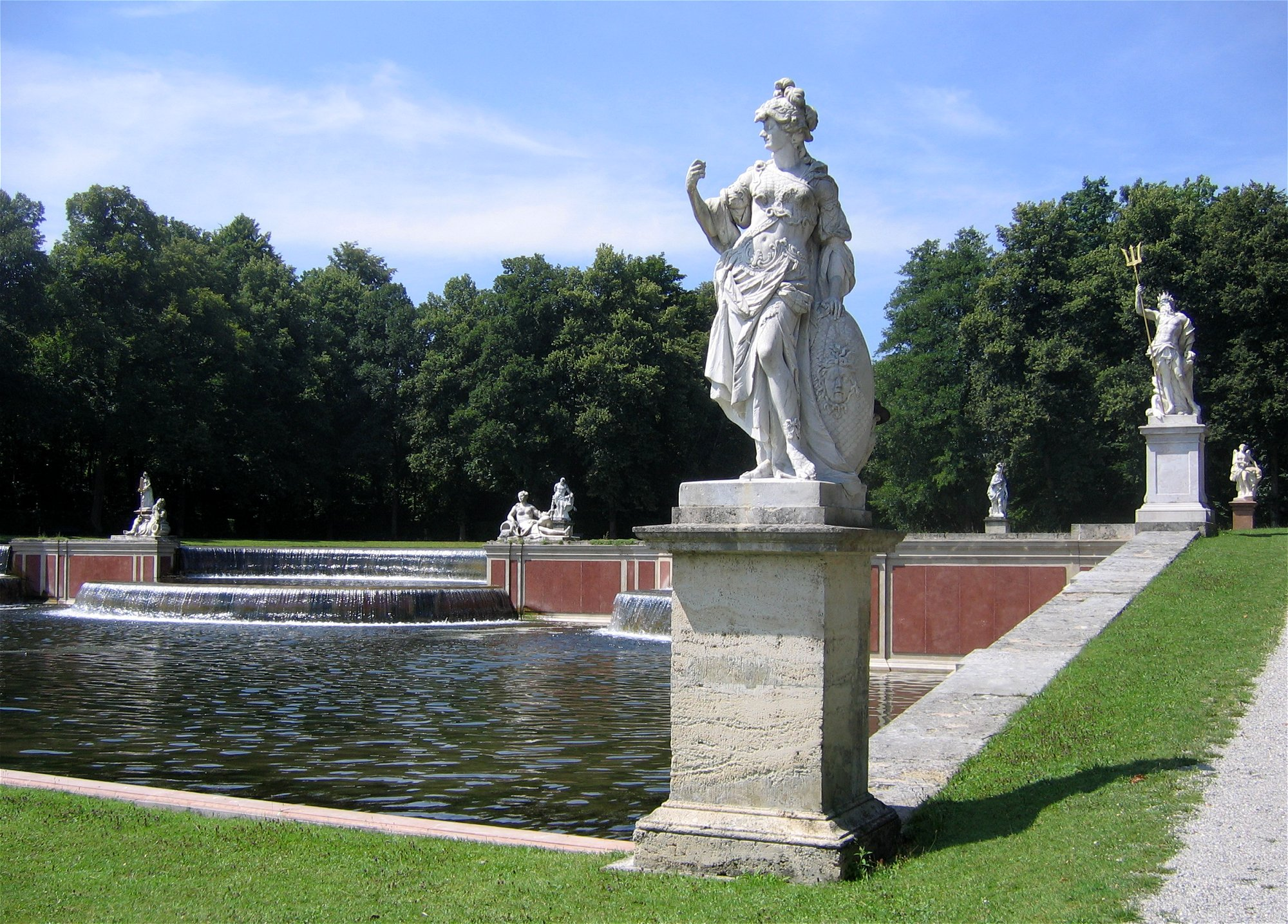 Schlosspark Nymphenburg, Große Kaskade, Im Vordergrund: Statue der Pallas Athene von Roman Anton Boos (um 1777)